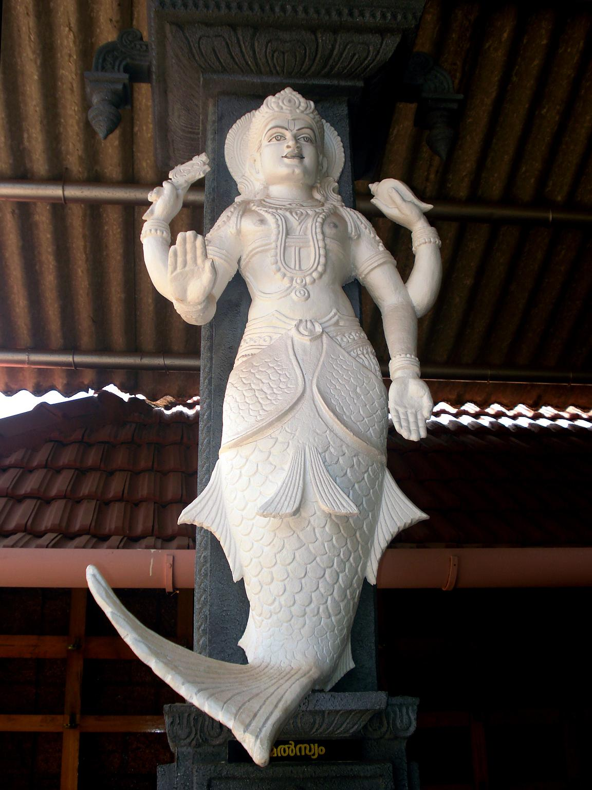 മഹാവിഷ്ണുവിന്റെ പത്ത് അവതാരങ്ങളിൽ ആദ്യത്തെതാണ് മത്സ്യം. ചിത്രം എടുത്തത് കേരളത്തിൽ കണ്ണൂർ ജില്ലയിലെ കൂടാളി താറ്റിയോട്ട് അമ്പലത്തിൽ നിന്നാണ്.